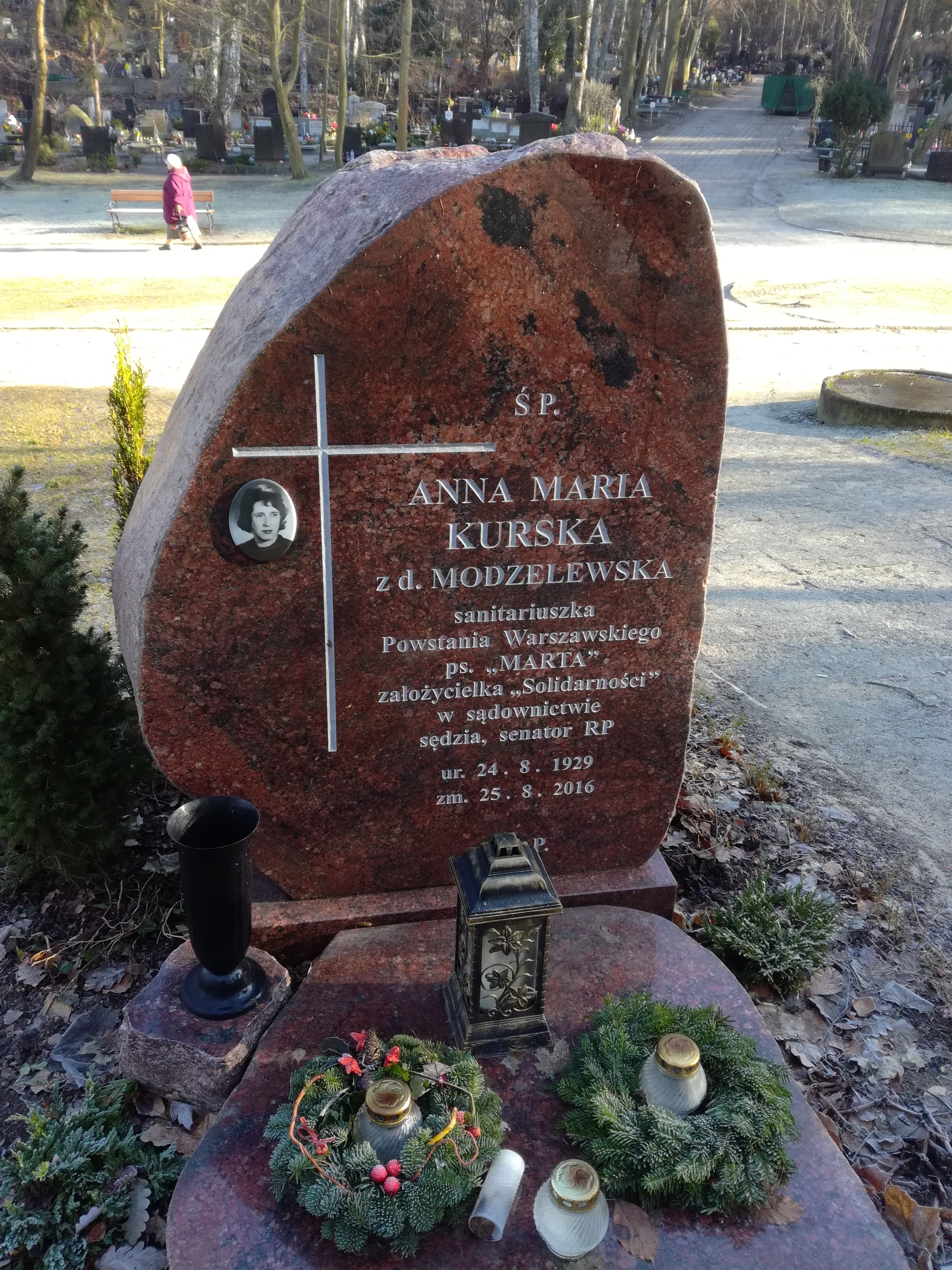 grób prawniczki Anny Kurskiej na cmentarzu Srebrzysko w Gdańsku.